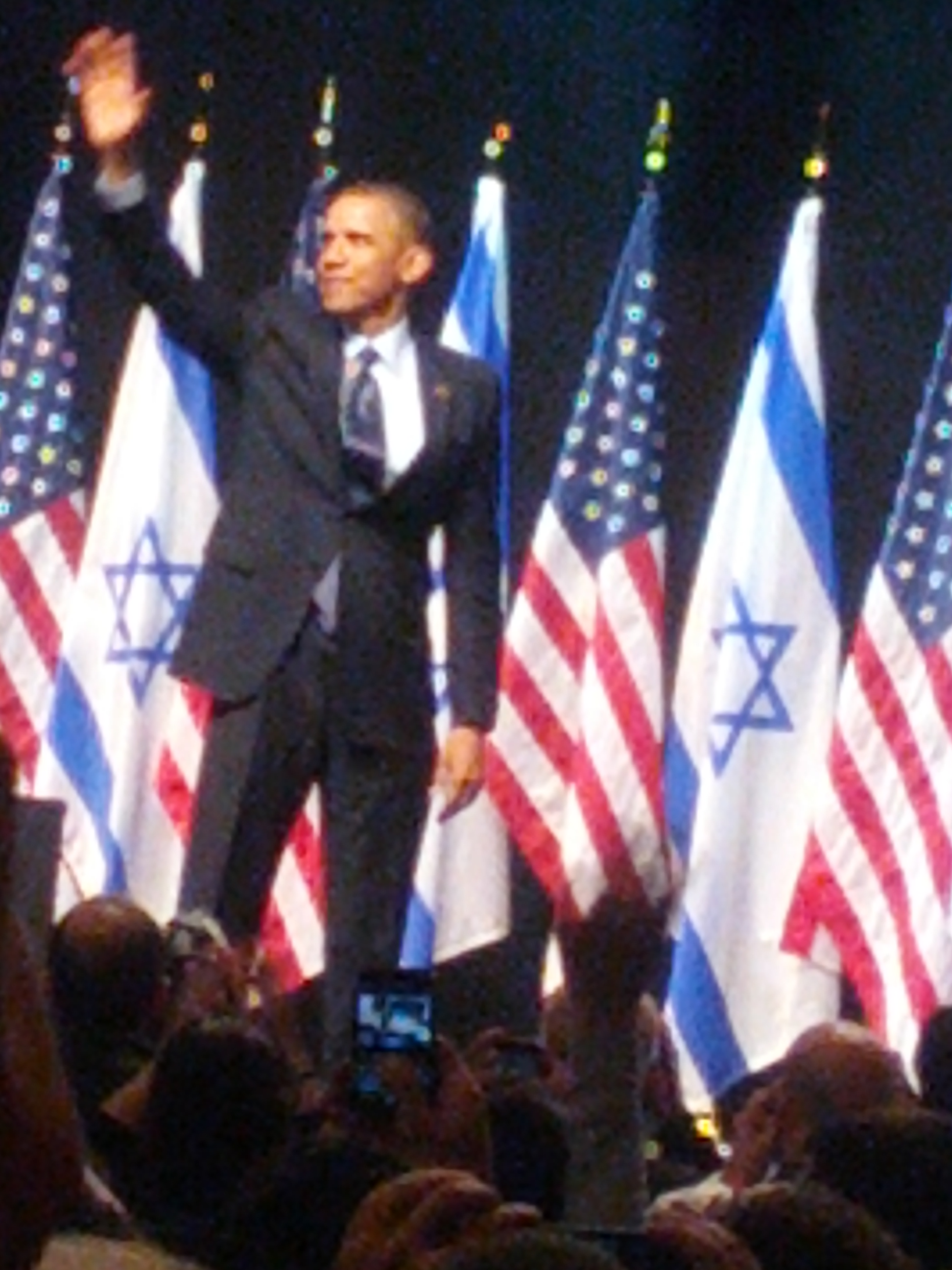 ברק אובמה, נשיאה הארבעים וארבעה של ארצות הברית, בבנייני האומה, שם נאם במהלך ביקורו בישראל.